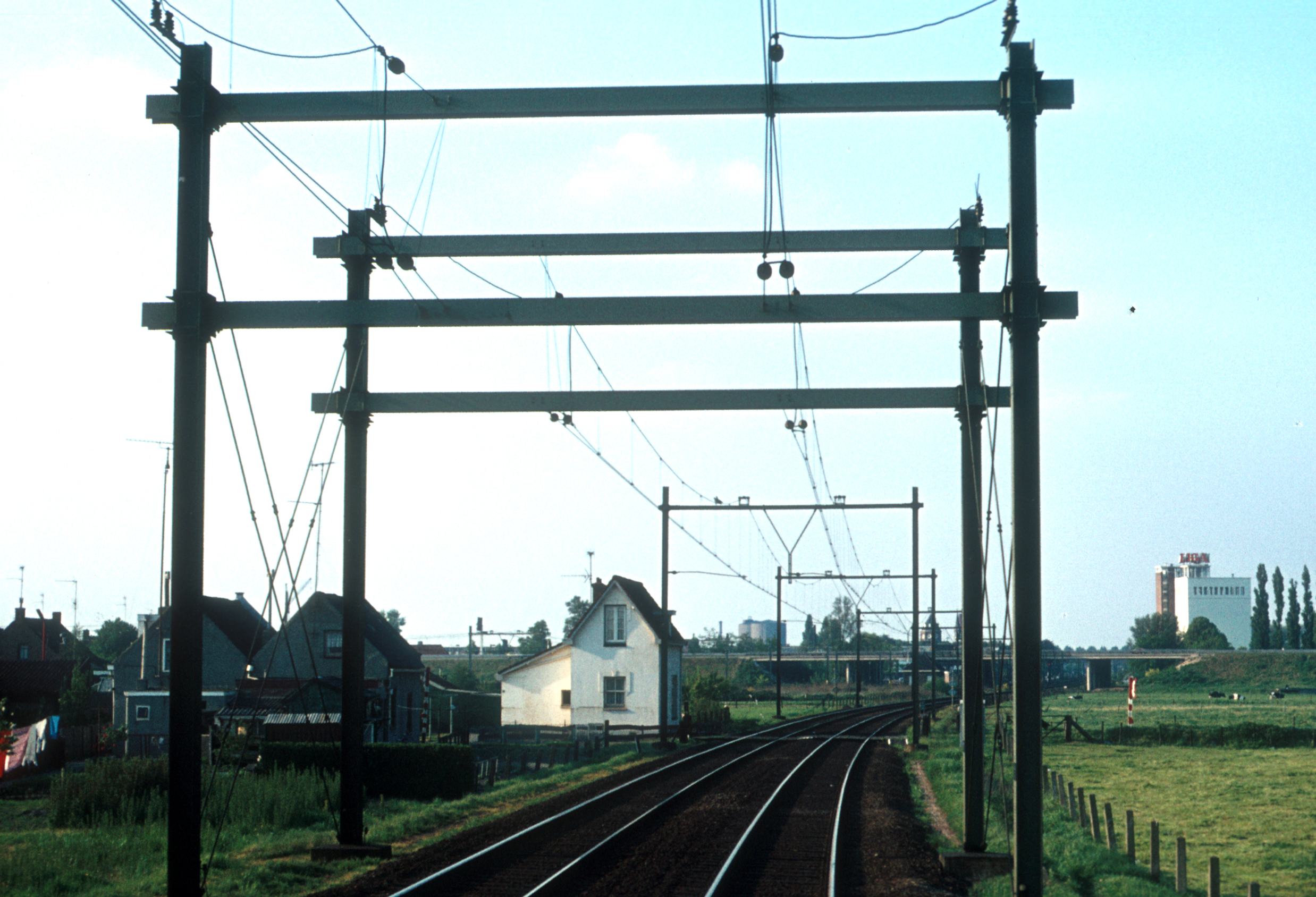 Spanningssluis bij Roosendaal tussen het Nederlands spoorwegnet en het Belgie's spoorwegnet.